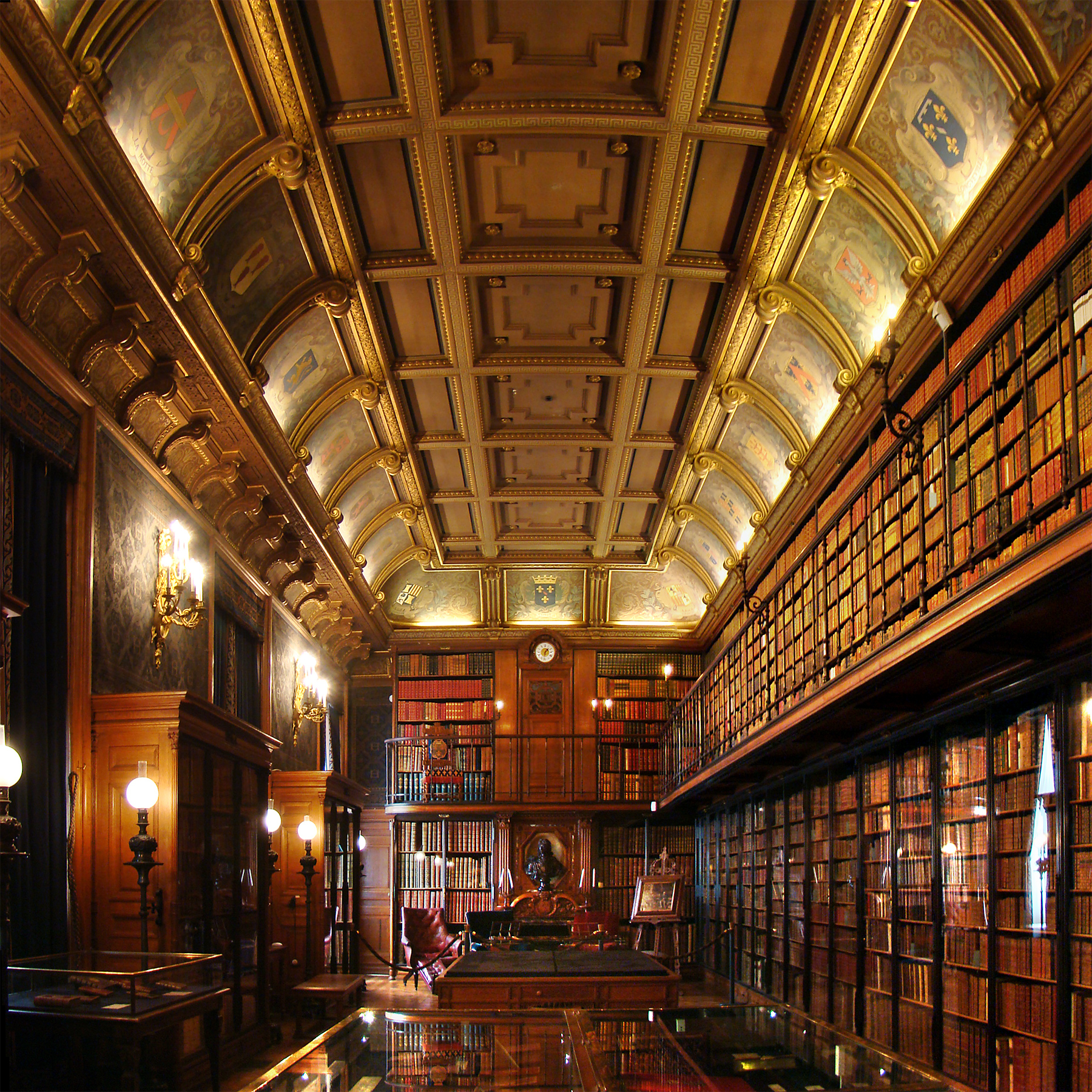 Château de Chantilly, Oise, Picardie, France. Le cabinet des Livres.